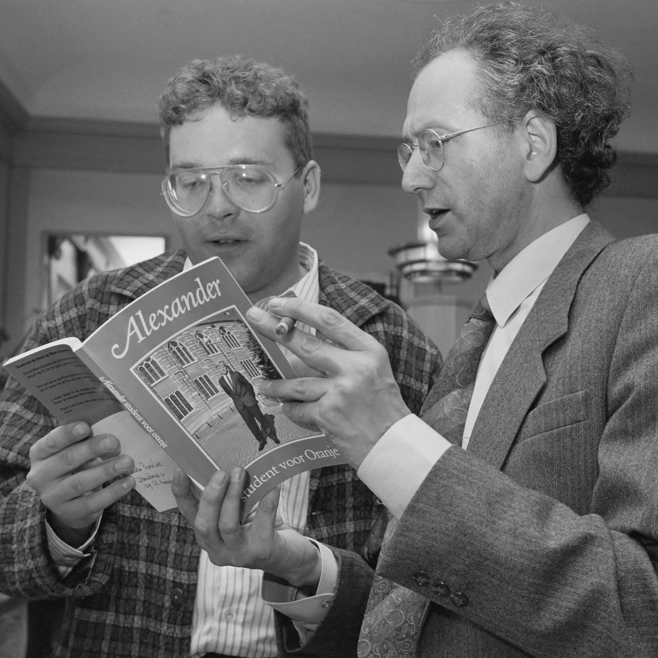 Propria Cures , red. Marcel Verreck biedt in Leiden 1e exemplaar boekje "Alexander, student voor Oranje" aan aan Martin van Amerongen (r) 19 augustus 1988